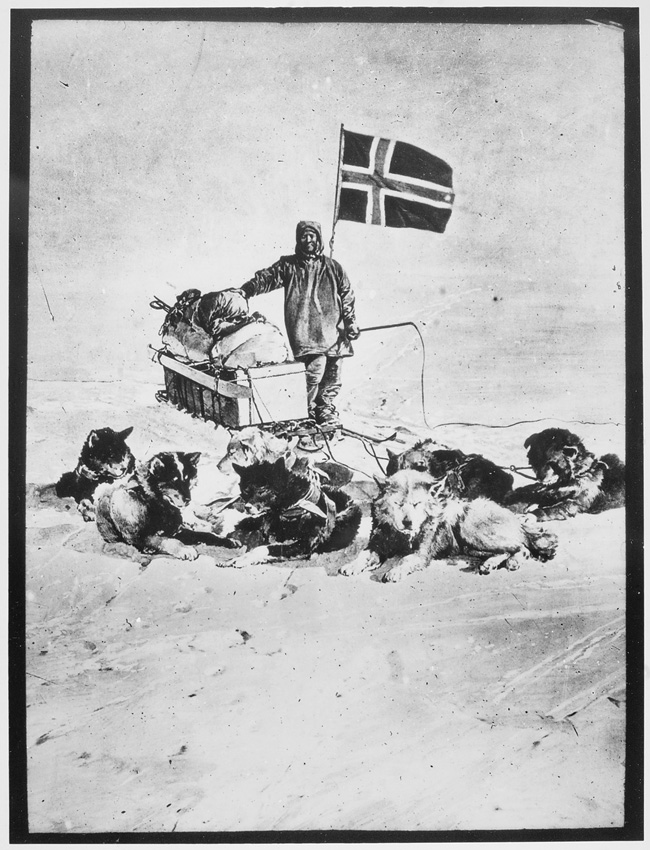 Beskrivelse: "14. desember 1911, seieren er vunnet. Det første hundespannet – ført av Oscar Wisting – er nådd frem til polpunktet." Fotograf: Amundsenekspedisjonen Arkivreferanse: Riksarkivet, UD Avdeling for presse, kultur og informasjon, Uc1, Roald Amundsen At the Pole Description: "December 14, 1911, victory is won. The first dog sled - led by Oscar Wisting - has reached the Pole." Photo: The Amundsen expedition